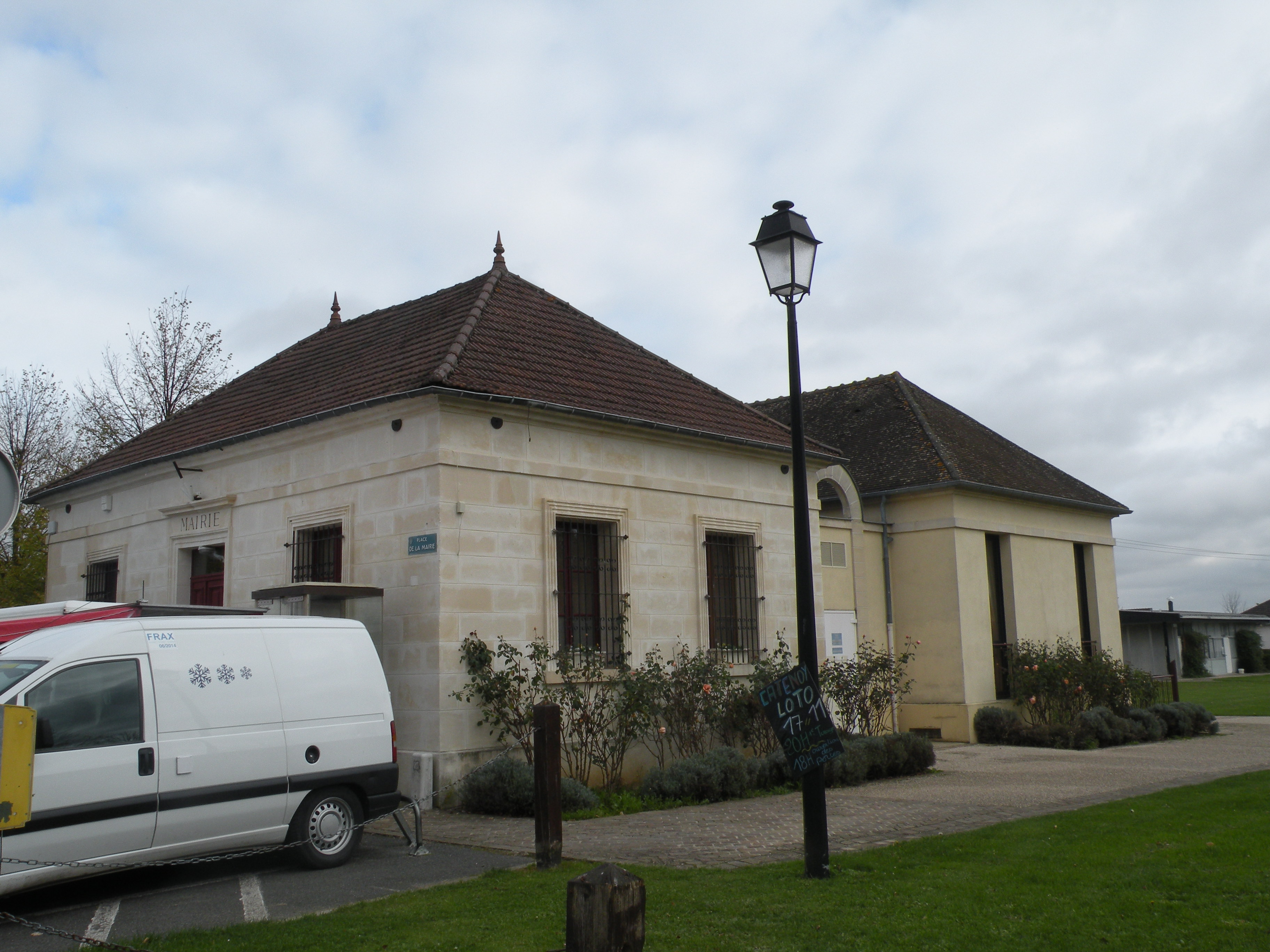 mairie Nointel (Oise)